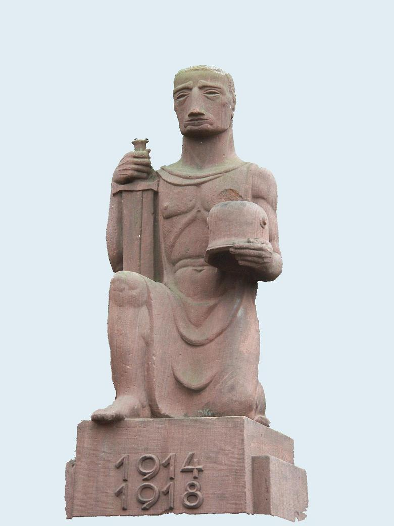 War Memorial - Krieger-/Kriegsopferdenkmal - Mémorial de guerre